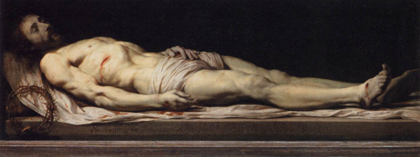 Peint avant 1654, date à laquelle le tableau fut gravé par Nicolas de Plattemontagne.Saisi à la Révolution à l'abbaye de Port-Royal de Paris.